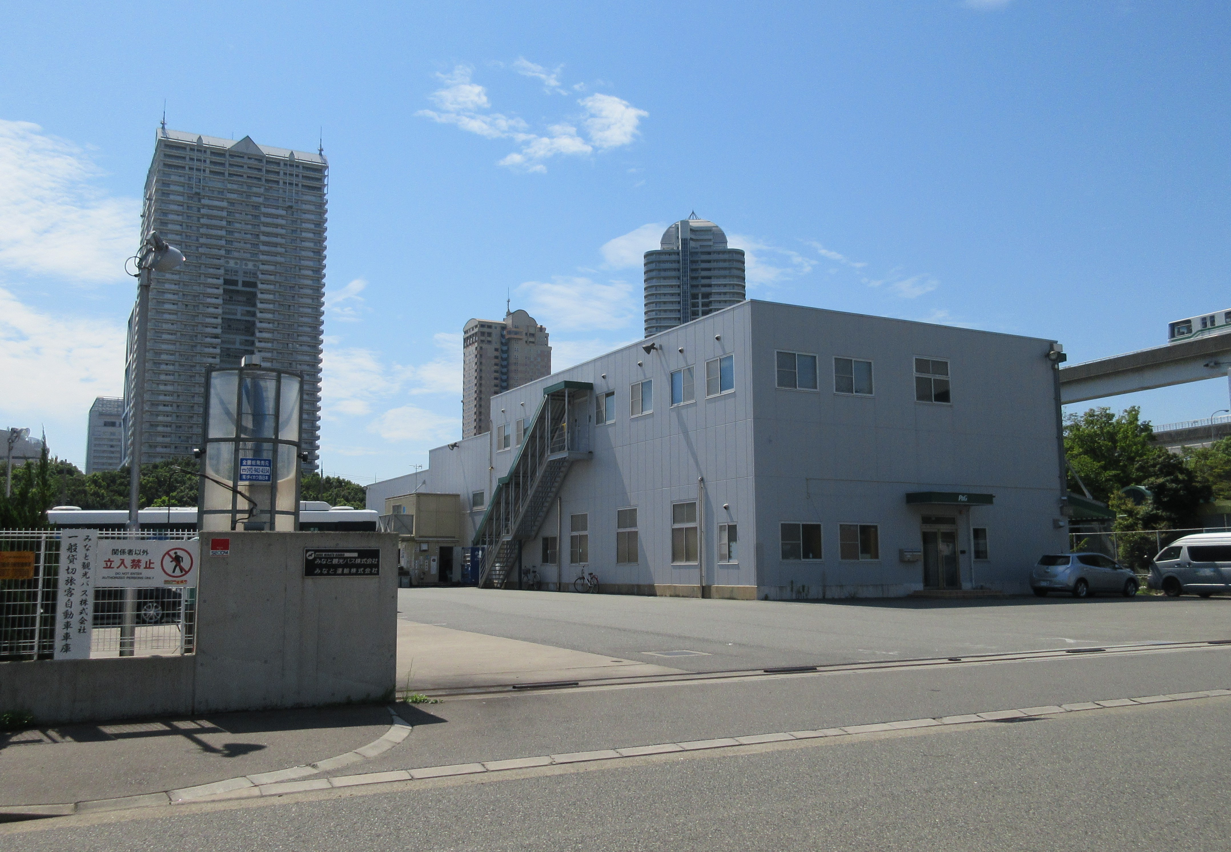 みなと観光バス (神戸市)本社